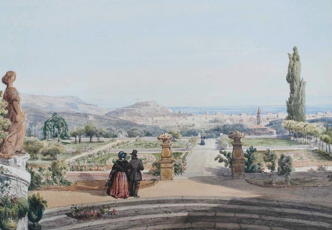 Aquarelle d'Urbain Garin de Cocconato (Bibliothèque du Chevalier de Cessole, Nice)